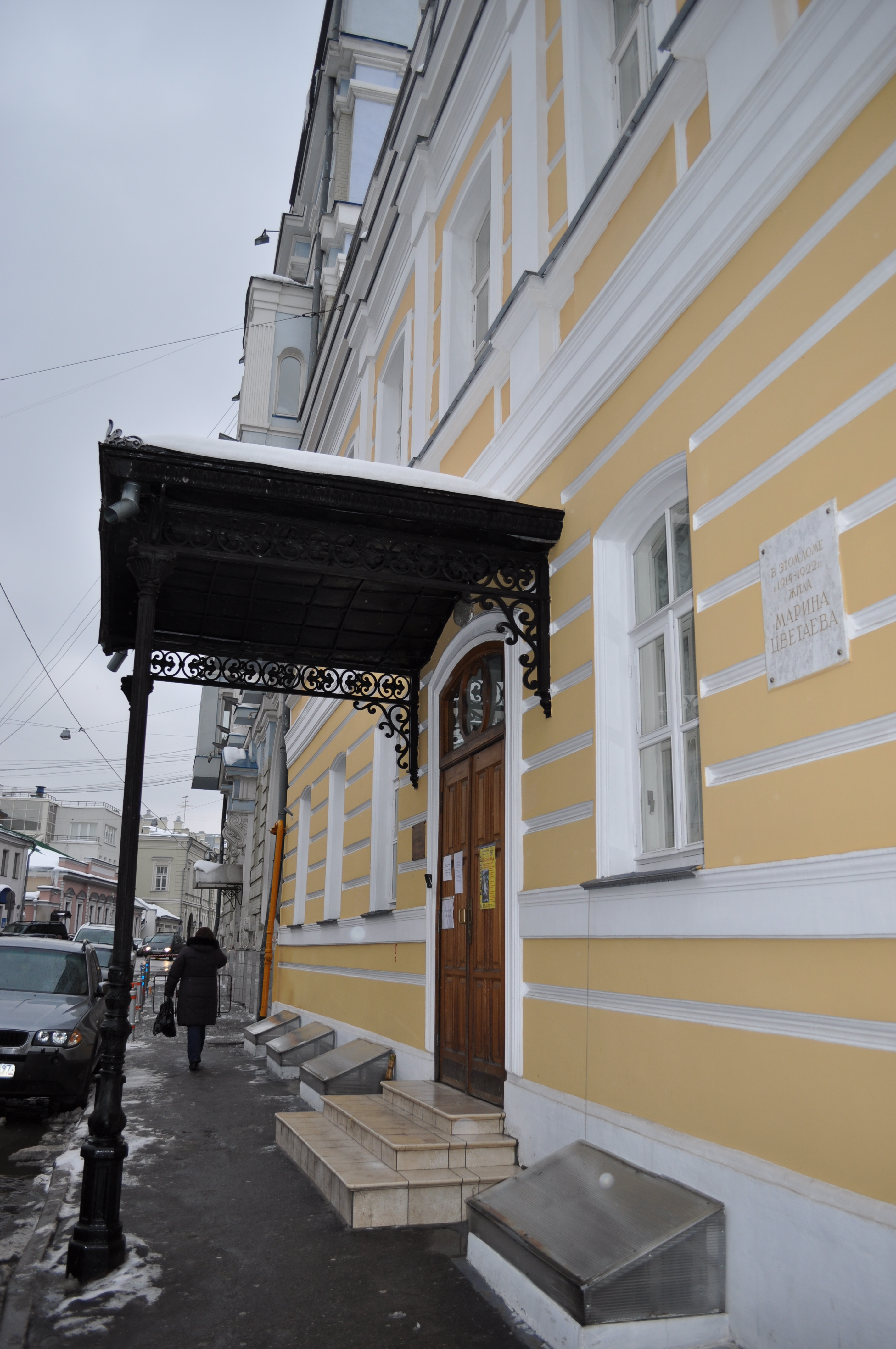 Парадный подъезд, ныне главный вход в музей